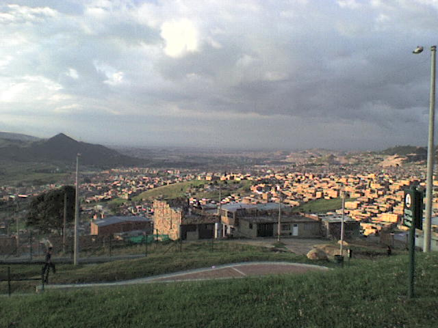 Barrio El Uval en Usme Bogotá D.C.